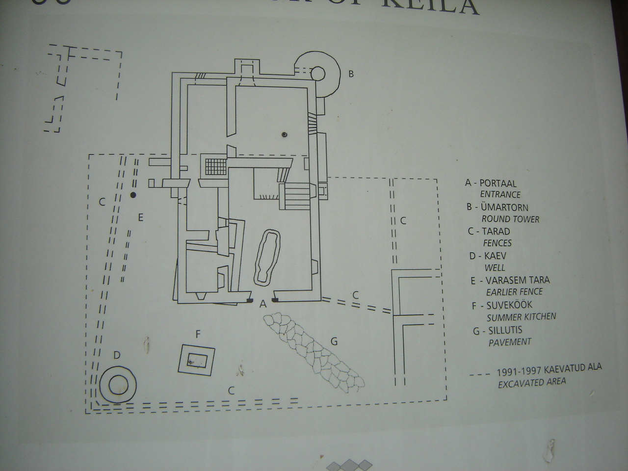 Keila vasallilinnuse plaan.